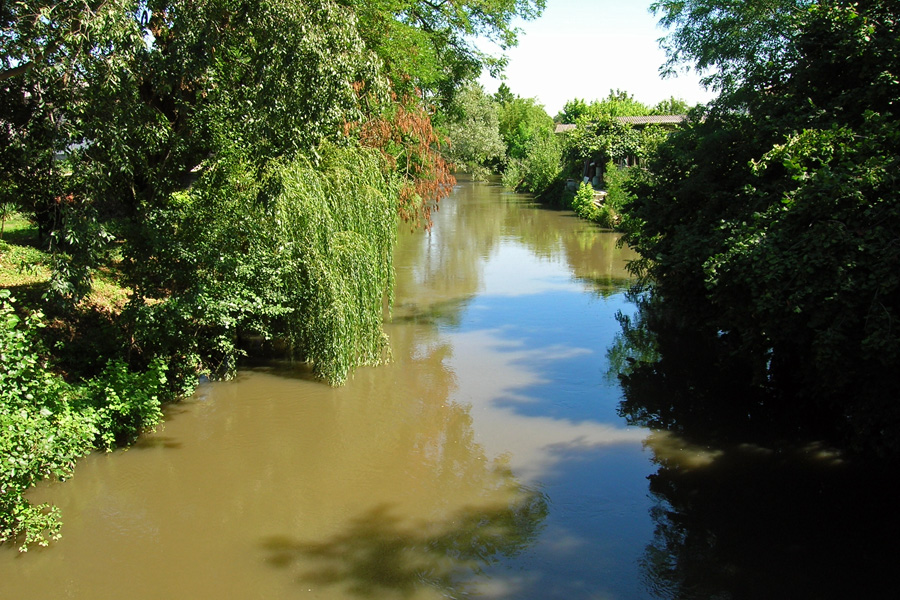 Il torrente Terdoppio a Tromello (PV)